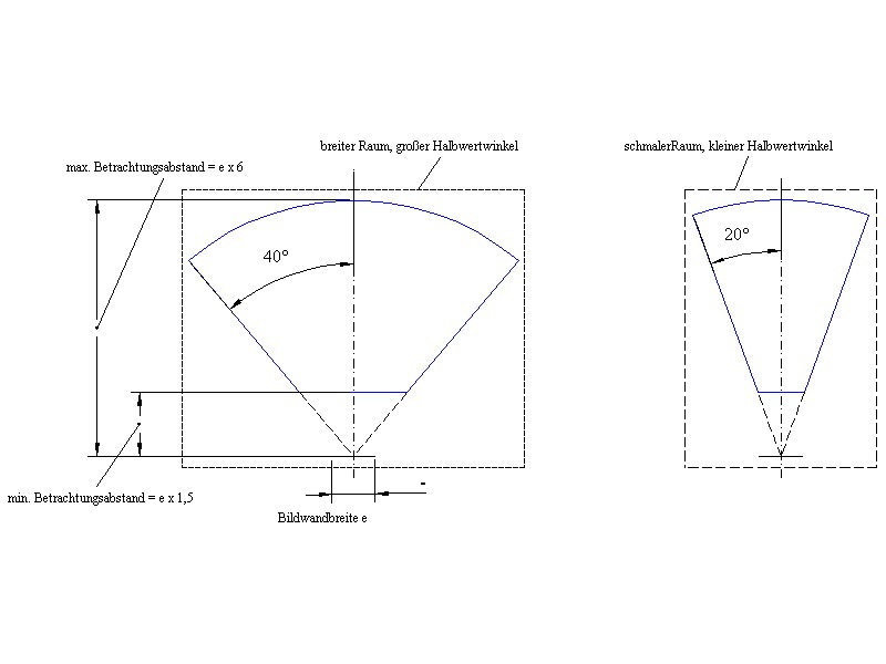 Bildwand mit großem oder schmalen Halbwertwinkel und den Einfluß auf den Betrachterraum